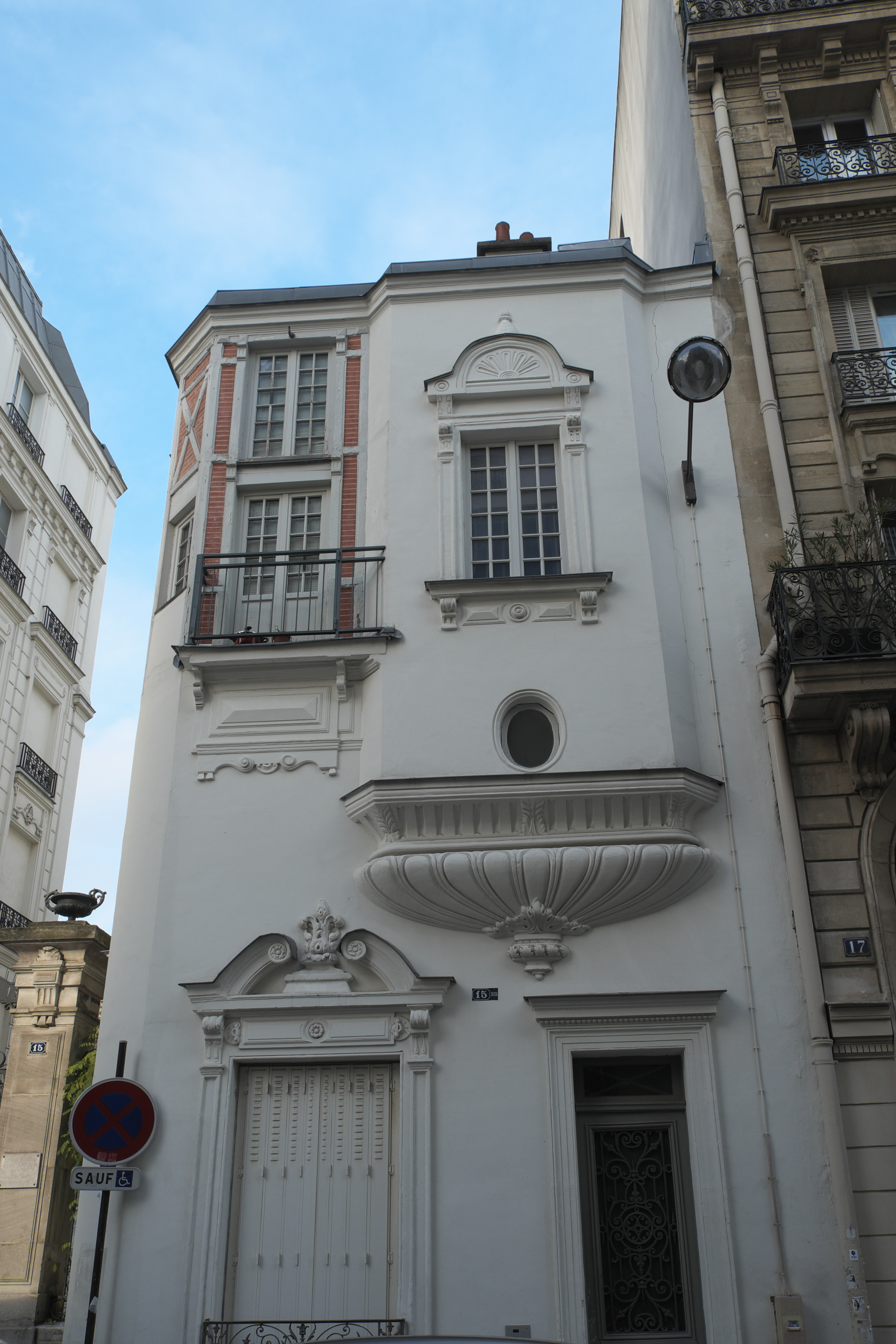 Villa des Arts im 18. Arrondissement in Paris (Île-de-France/Frankreich)